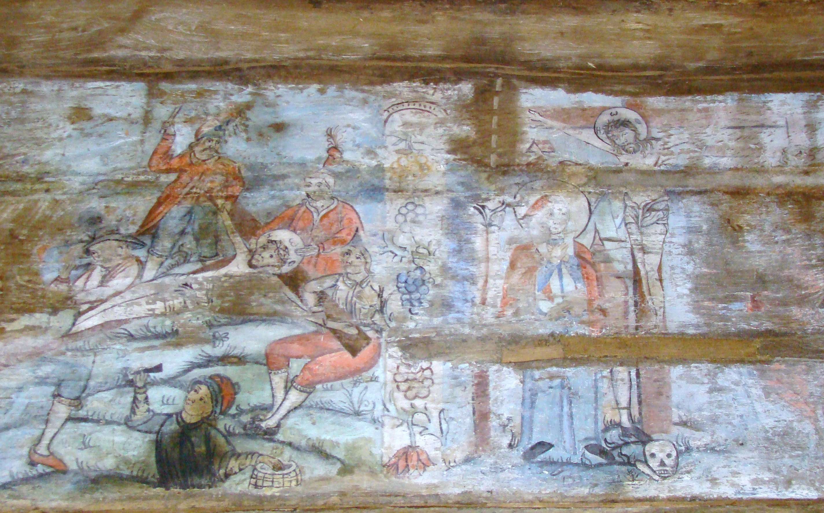 Biserica de lemn "Intrarea Maicii Domnului în Biserică" , sat BÂRSANA